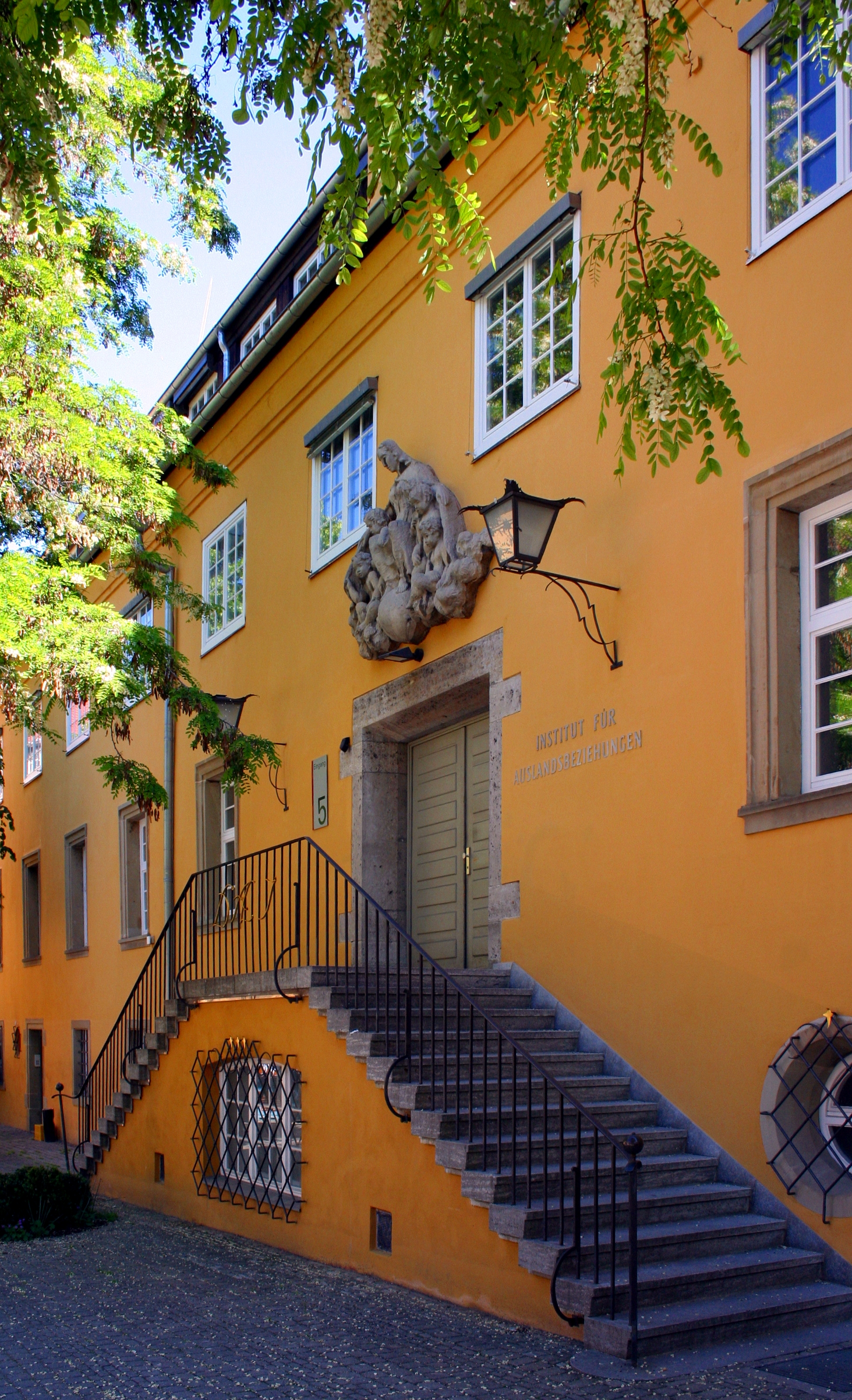 Institut für Auslandsbeziehungen, Charlottenplatz 17 in Stuttgart